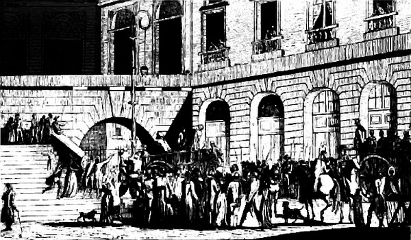 Départ de la charrette des Girondins de la Cour du Mai du Palais de Justice de Paris